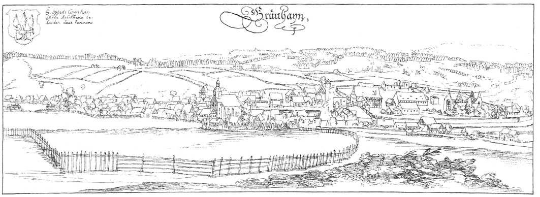 Stadt Grünhain und Kloster, Gesamtansicht, 1620er Jahre